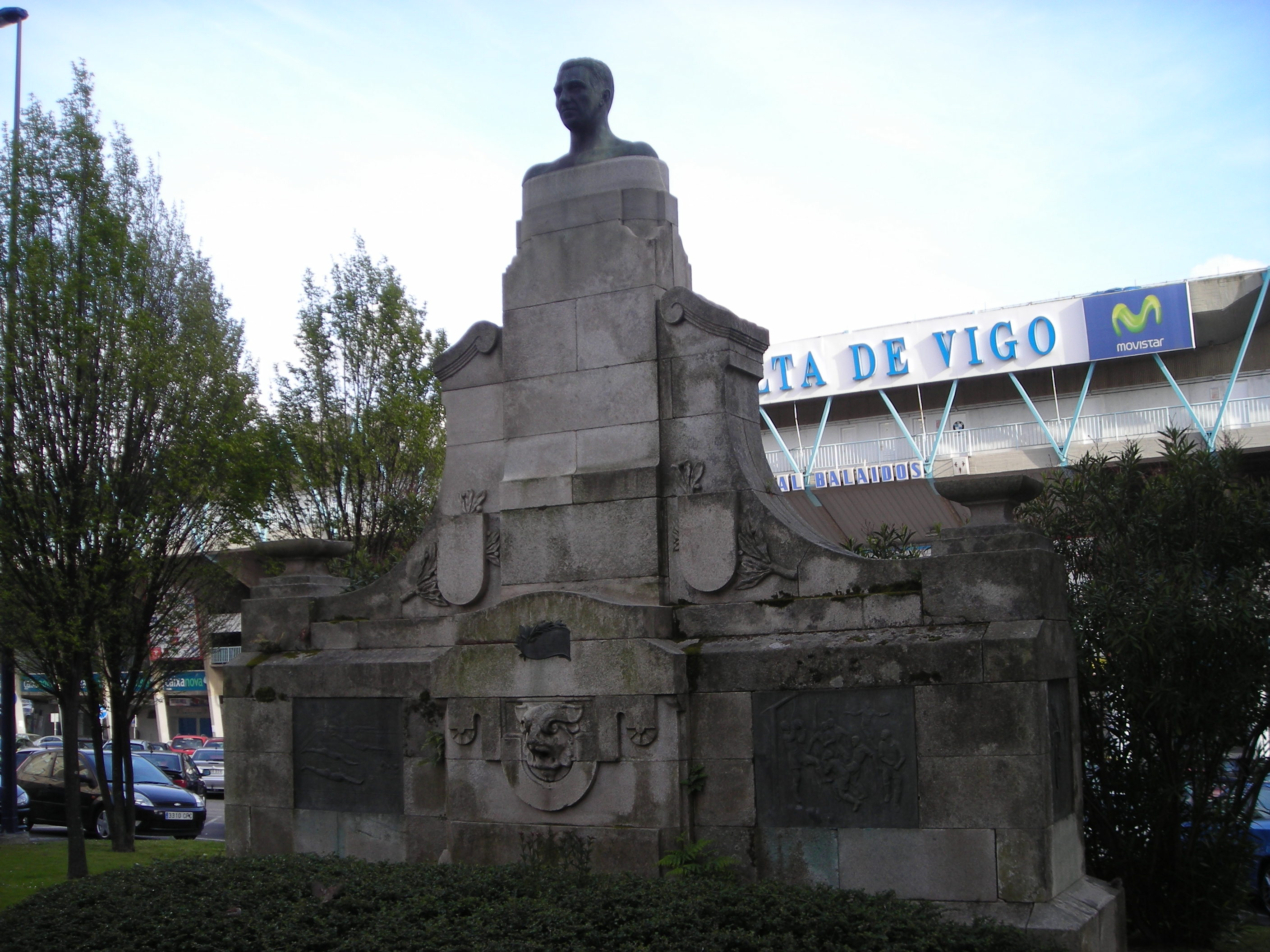 Escultura adicado a Manuel de Castro González